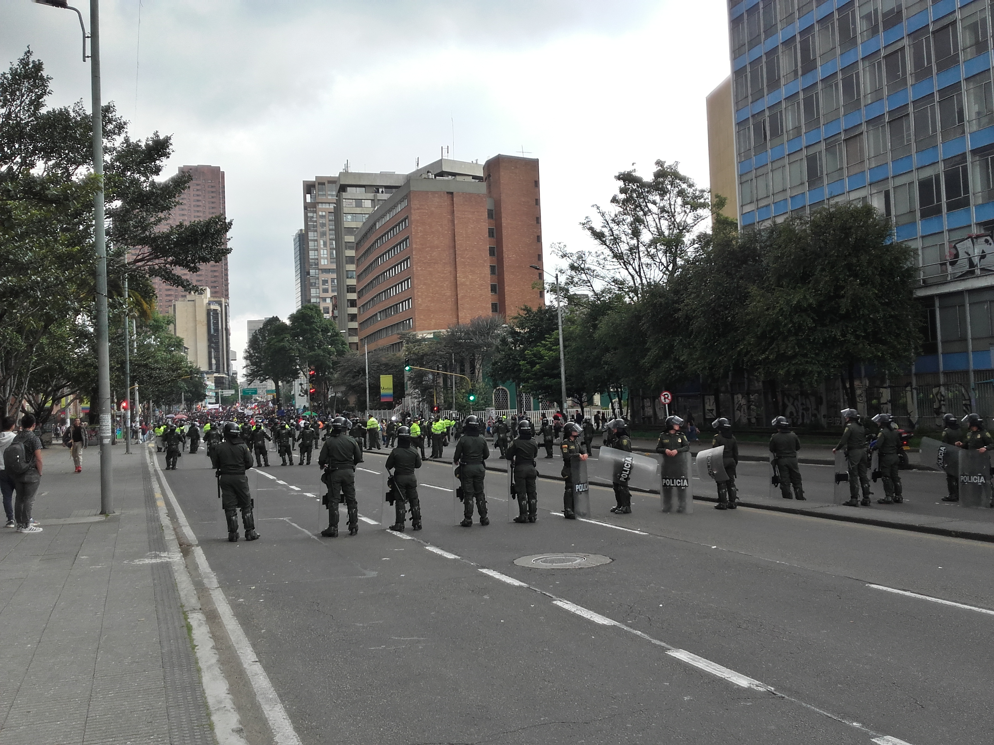 ckmffnkfkfkfkfkf